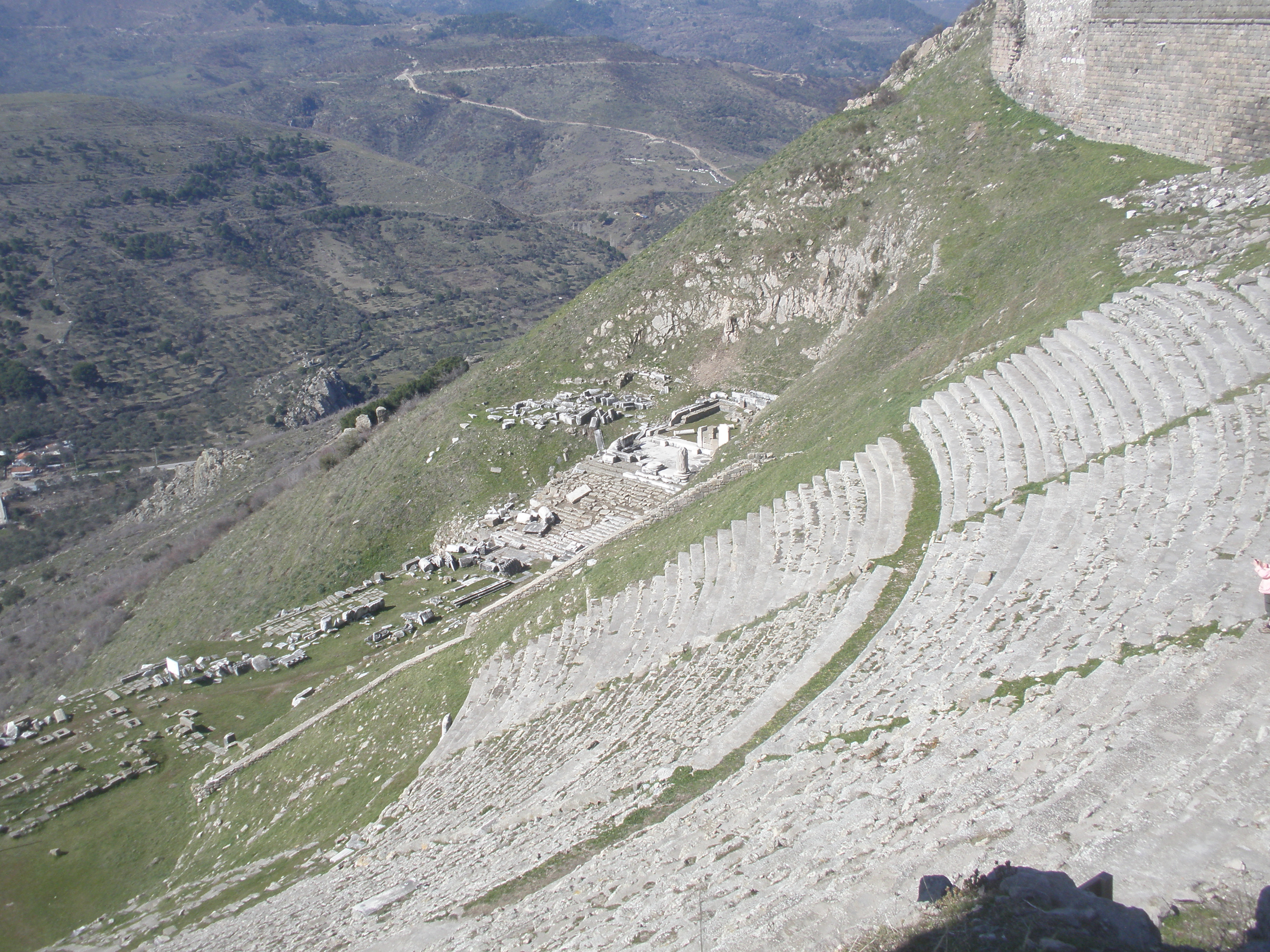 On voit ici que le temple de Dioonysos situé au nord de la terrasse s'élève sur un podium et il apparaît que la cavea est composée de trois parties séparées par deux promenoirs.